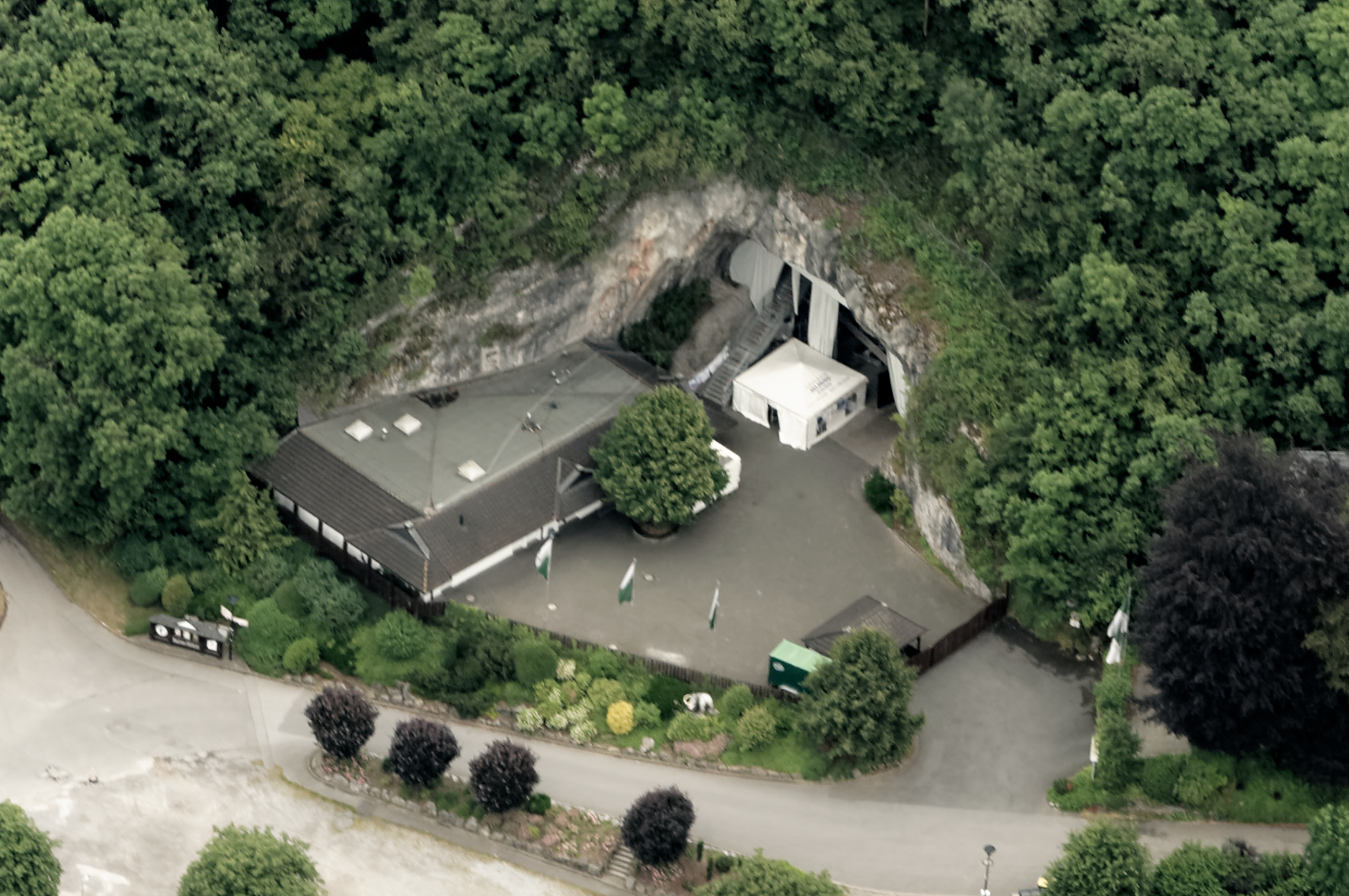 Fotoflug Sauerland Nord. Eingangsbereich der Balver Höhle The making of this document was supported by the Community-Budget of Wikimedia Germany.